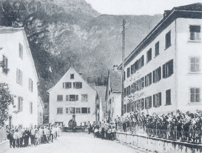 Altes Rathaus & Schulaus um 1905